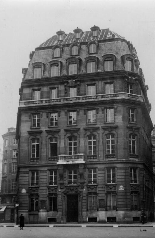 La Commissariat général aux question juives s'installera á l'ancienne banque L. Louis-Deyfus M. Xavier Vallat, commissaire général aux question juives, transferera prochainement ses services parisiens de la rue de Florence à la banque L. Louis-Deyfus, place des Petits-Pères. N.P.M.: Vue extérieure de l`immeuble qui sera occupè prochainement par les services du Commissariat général aux question juives. (Parno) 12.4.41 [Herausgabedatum] 4015-41